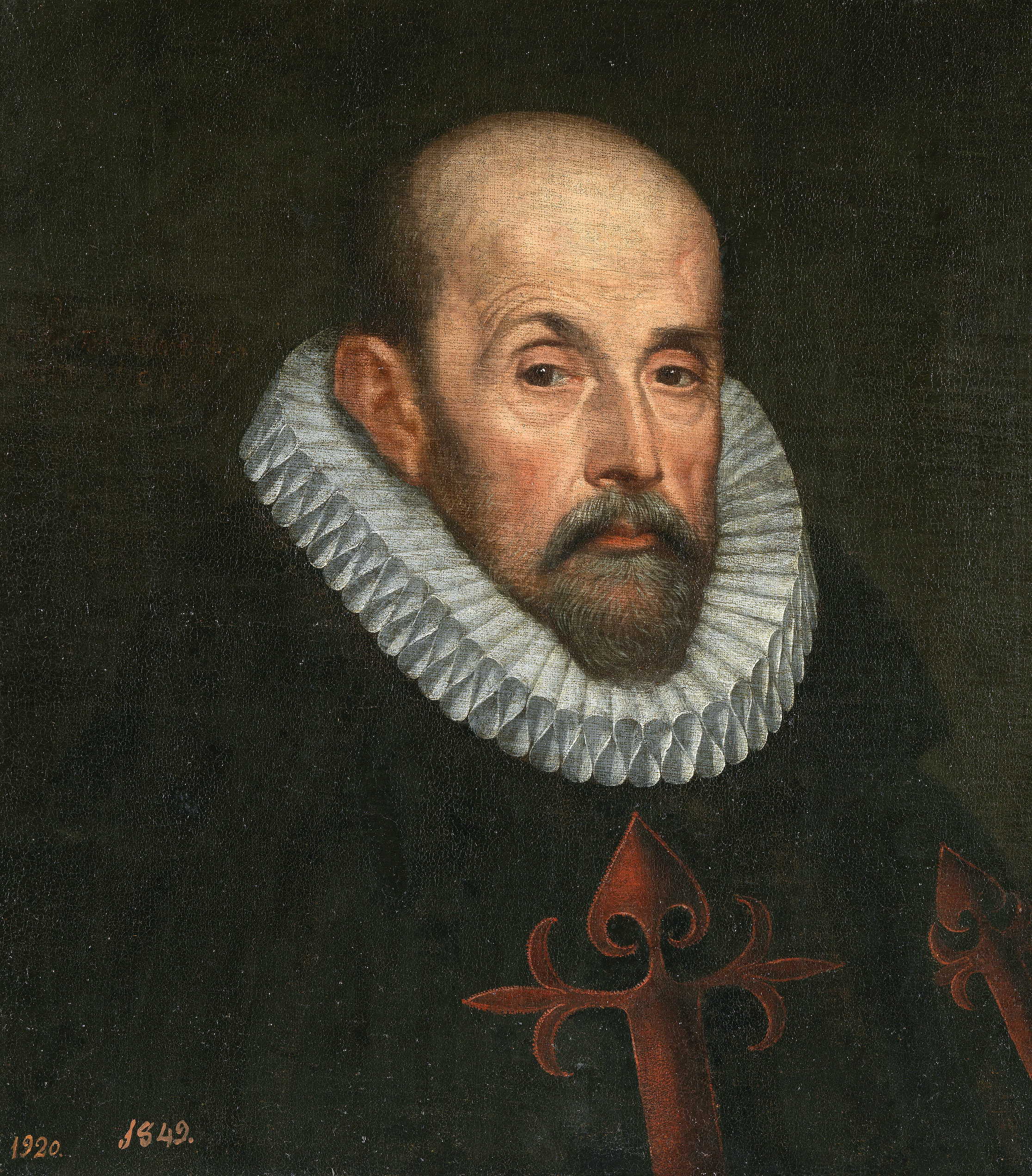 Caballero santiaguistalabel QS:Les,"Caballero santiaguista"